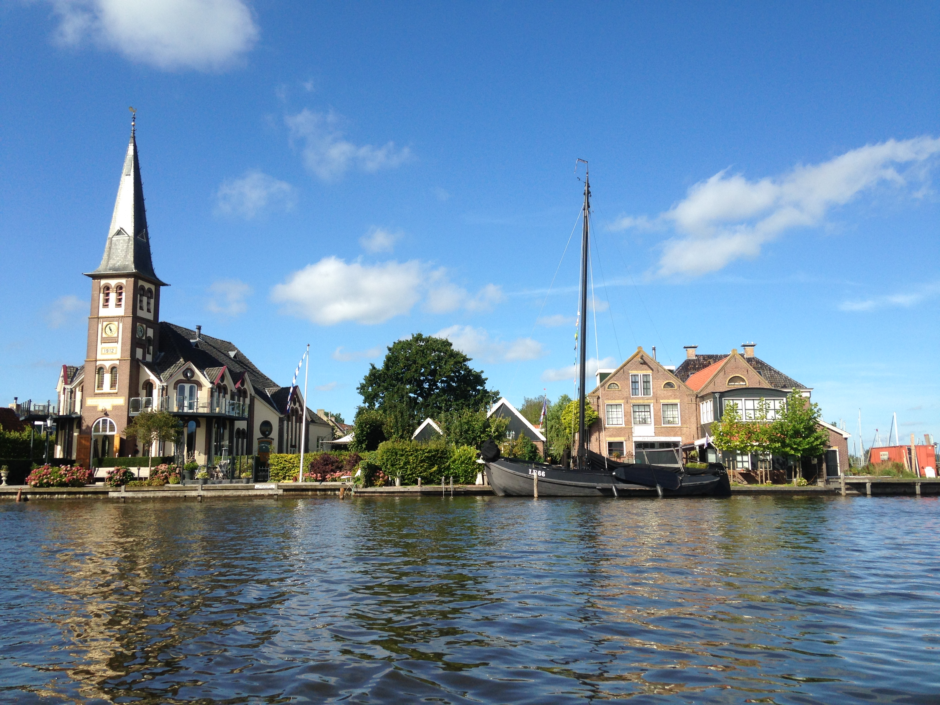 De voormalige Gereformeerde Kerk in Woudsend is nu in gebruik als woonhuis.